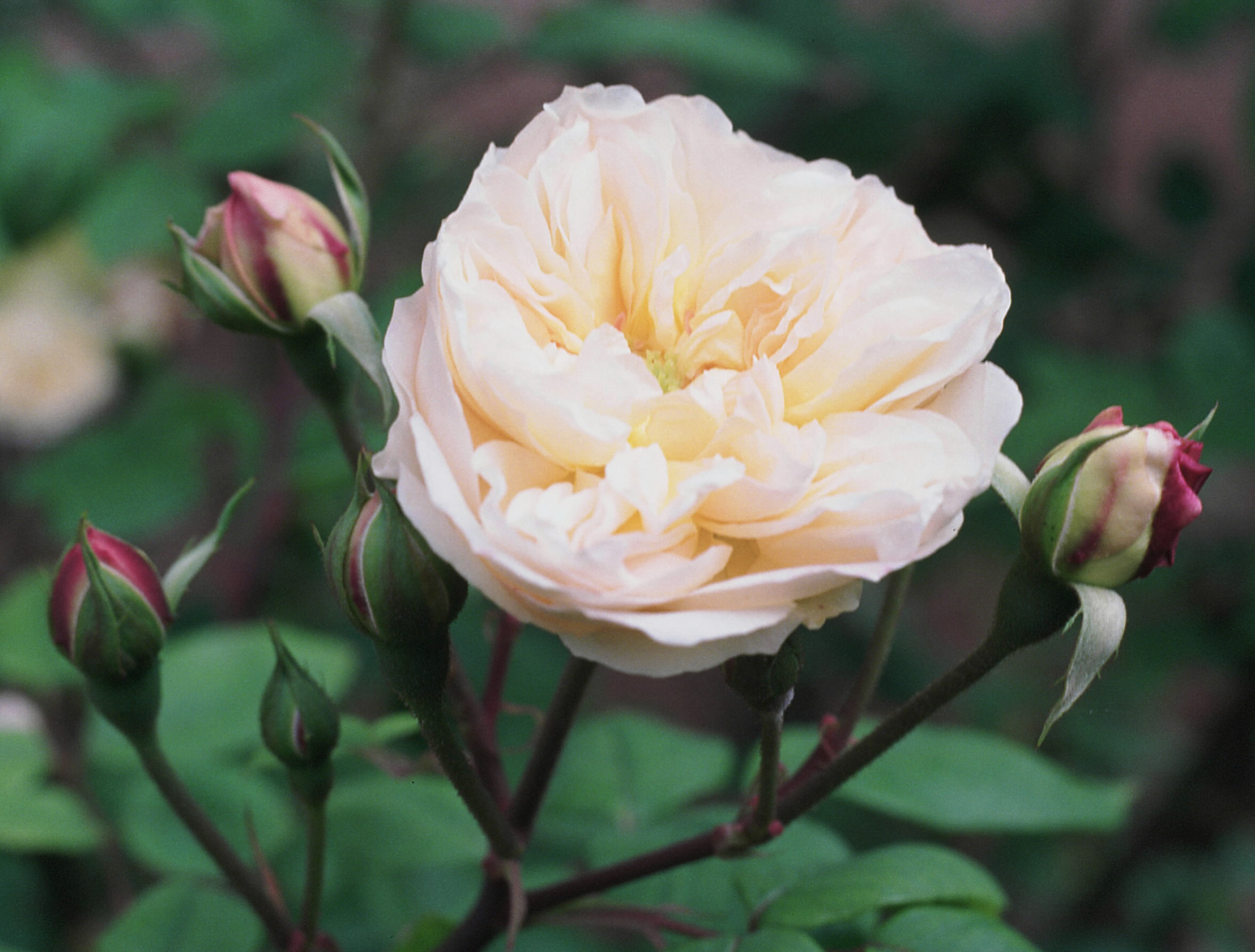 Rosa 'Desprez à Fleurs Jaunes', gr. Noisettianas, sect. Chinensis. Real Jardín Botánico, Madrid, abril 1988, A. Barra.